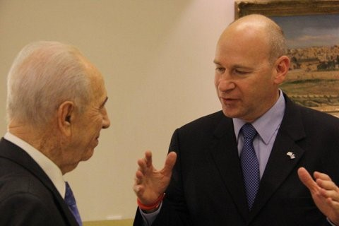 נדב תמיר בשיחת ייעוץ עם נשא מדינת ישראל, שמעון פרס